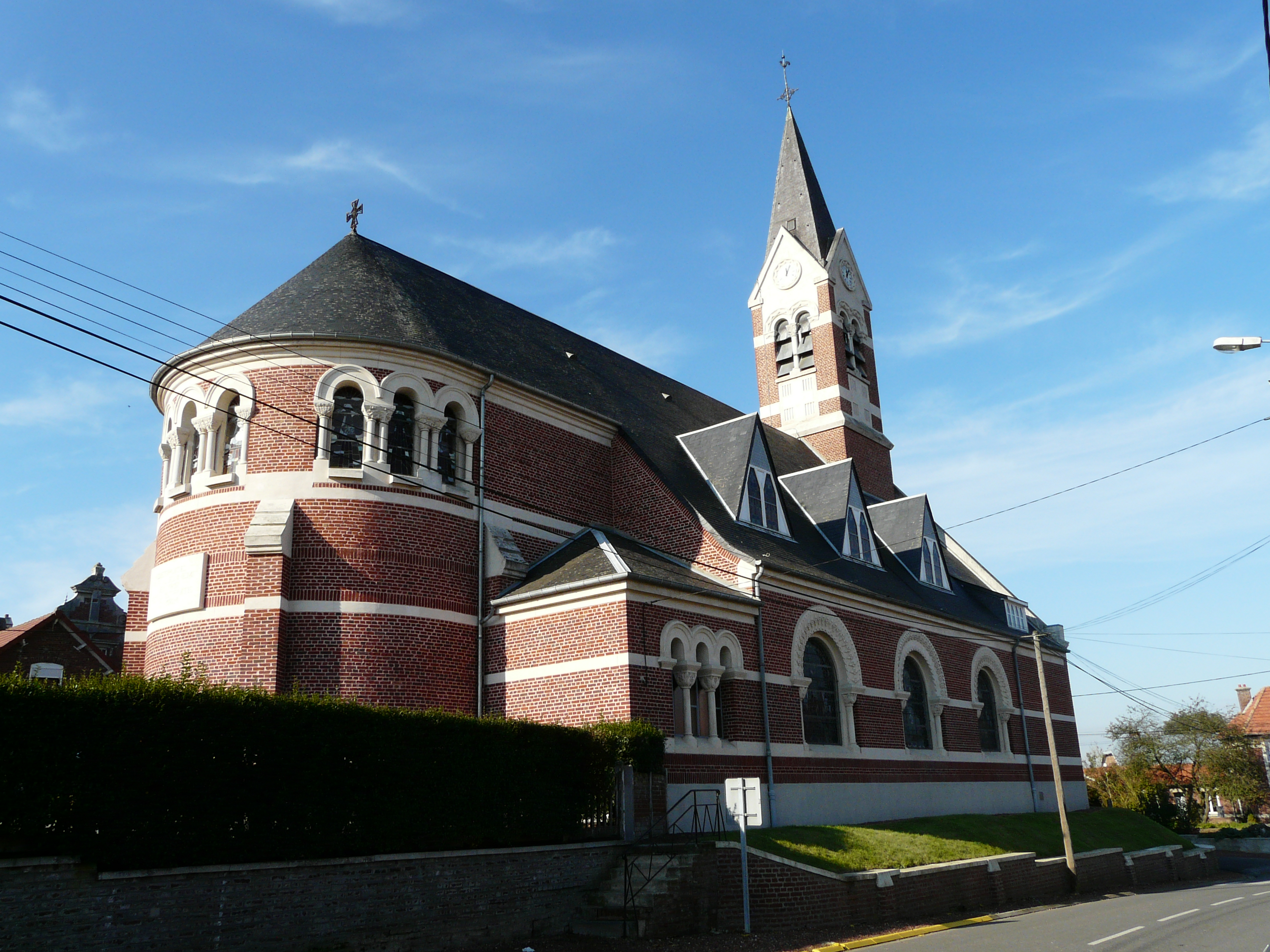 église de Flesquières (Nord, France) : vue du chevet